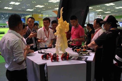 Exhibitiones en RemaxWorld Expo